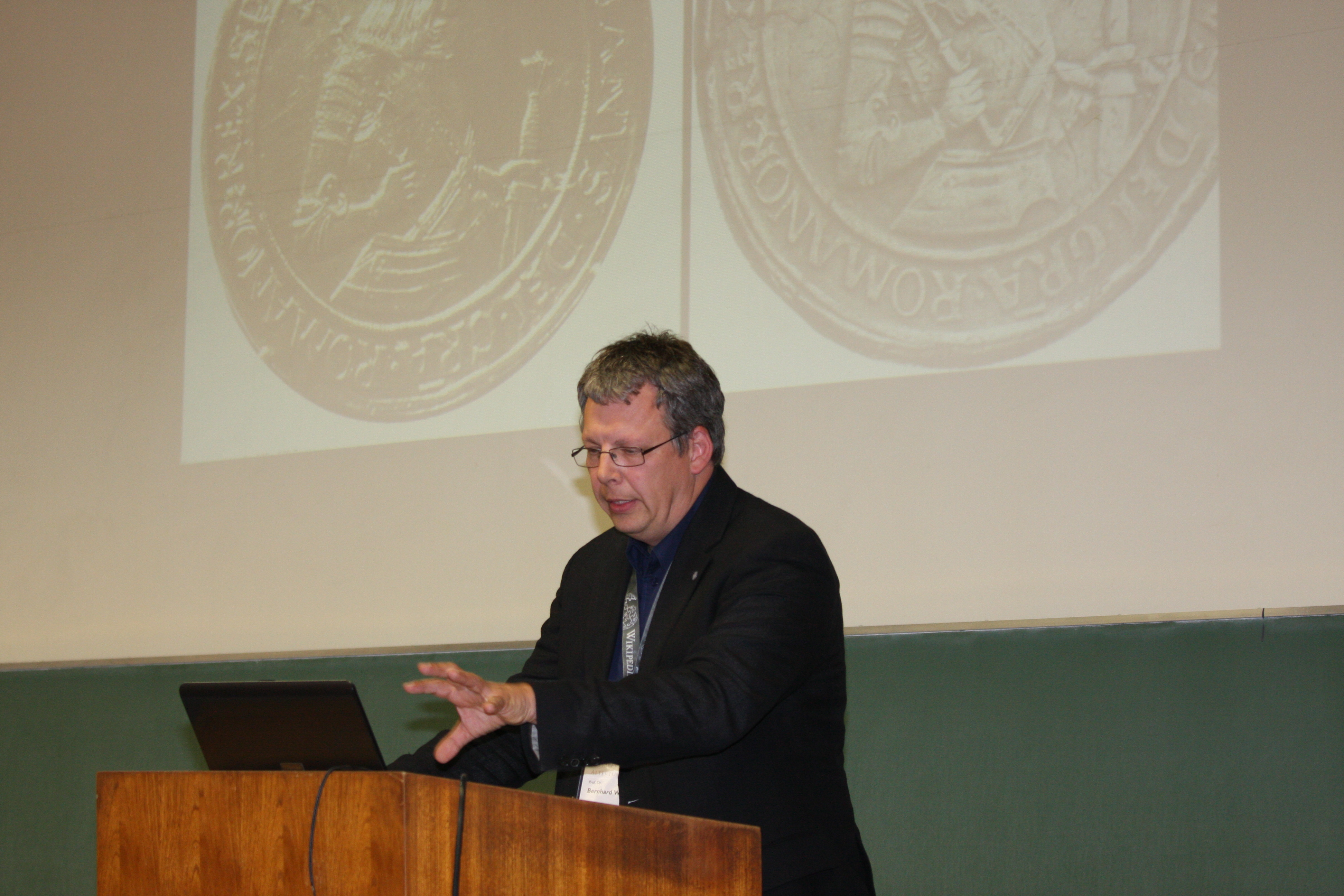 Bernhard Weisser, deutscher Numismatiker, auf der Konferenz „Wikipedia trifft Altertum“ in Göttingen